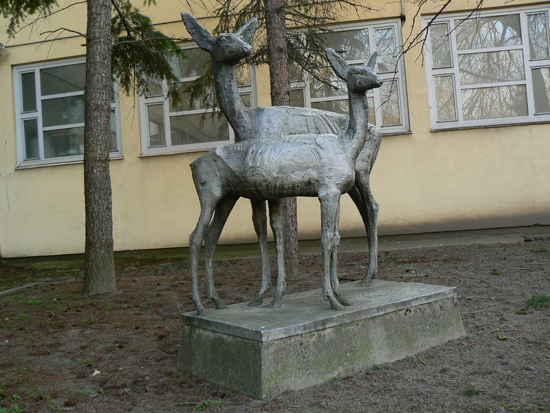 Somogyi József Őzek című szobra Szeged, Felső-Tiszaparti Gimnázium. 1968.